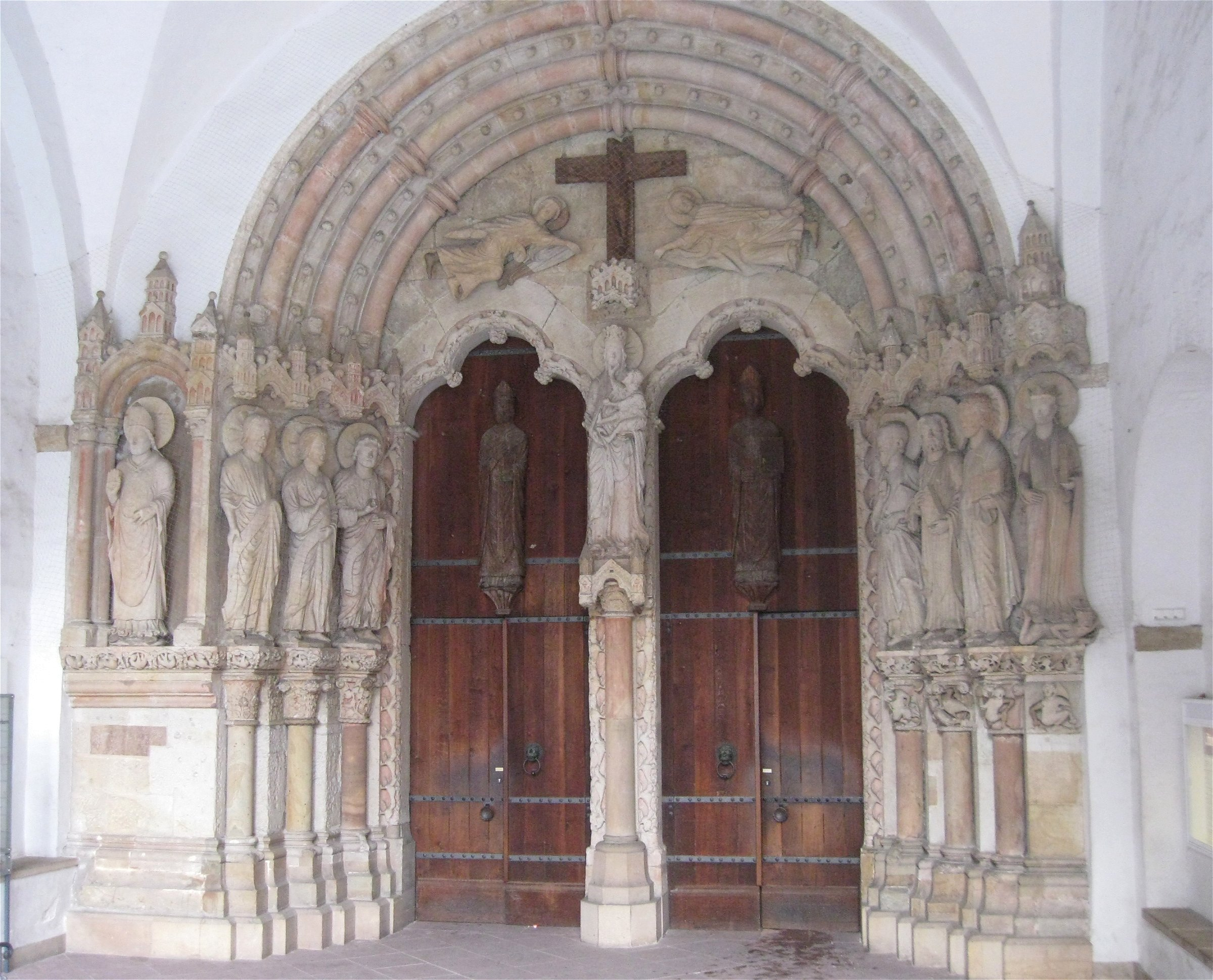 Paradiesportal zum Dom, Paderborn